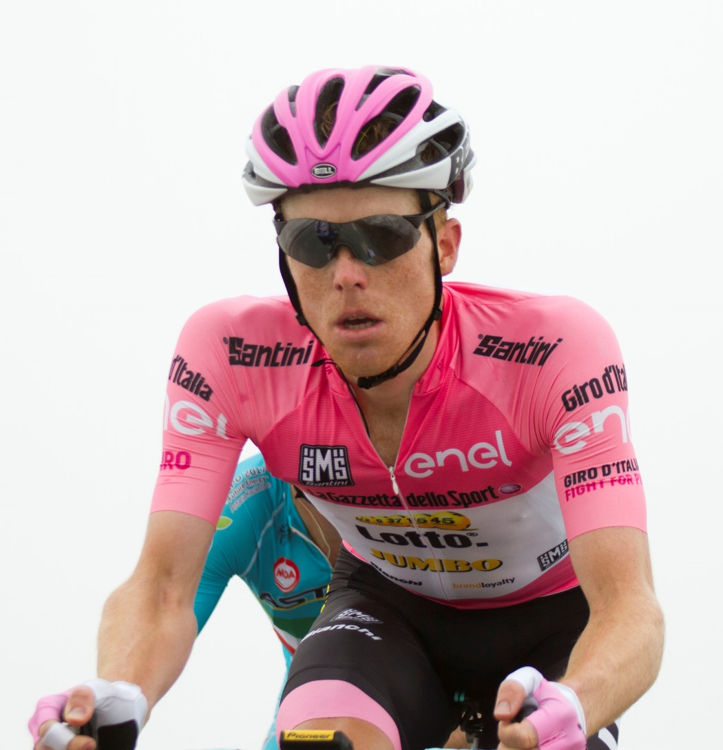 262 kruiswijk